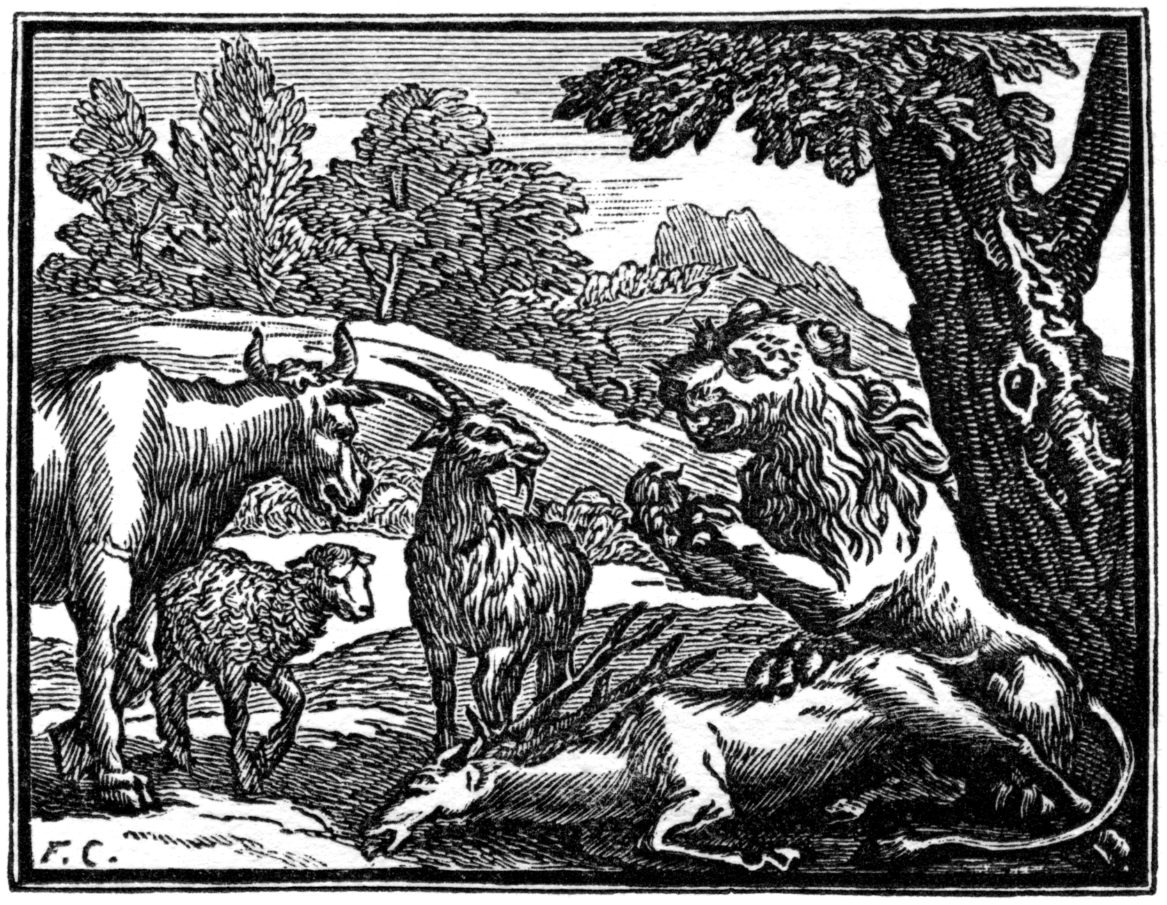 Illustrations pour les « Fables choisies mises en vers par M. de la Fontaine », Claude Barbin et Denys Thierry, Paris, 1668 (premier recueil) 1678-79 (deuxième recueil) 1694 (troisième recueil). Numérotation Charpentier (1705).